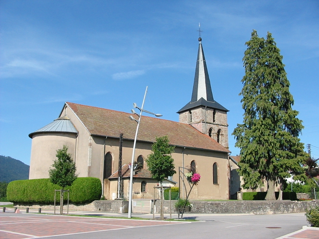 Sainte-Marguerite, commune des Vosges dans le canton de Saint-Dié-Est. L'église Sainte-Marguerite.